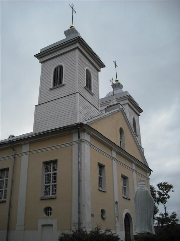 Pandėlio Švč. Mergelės Marijos Vardo bažnyčia